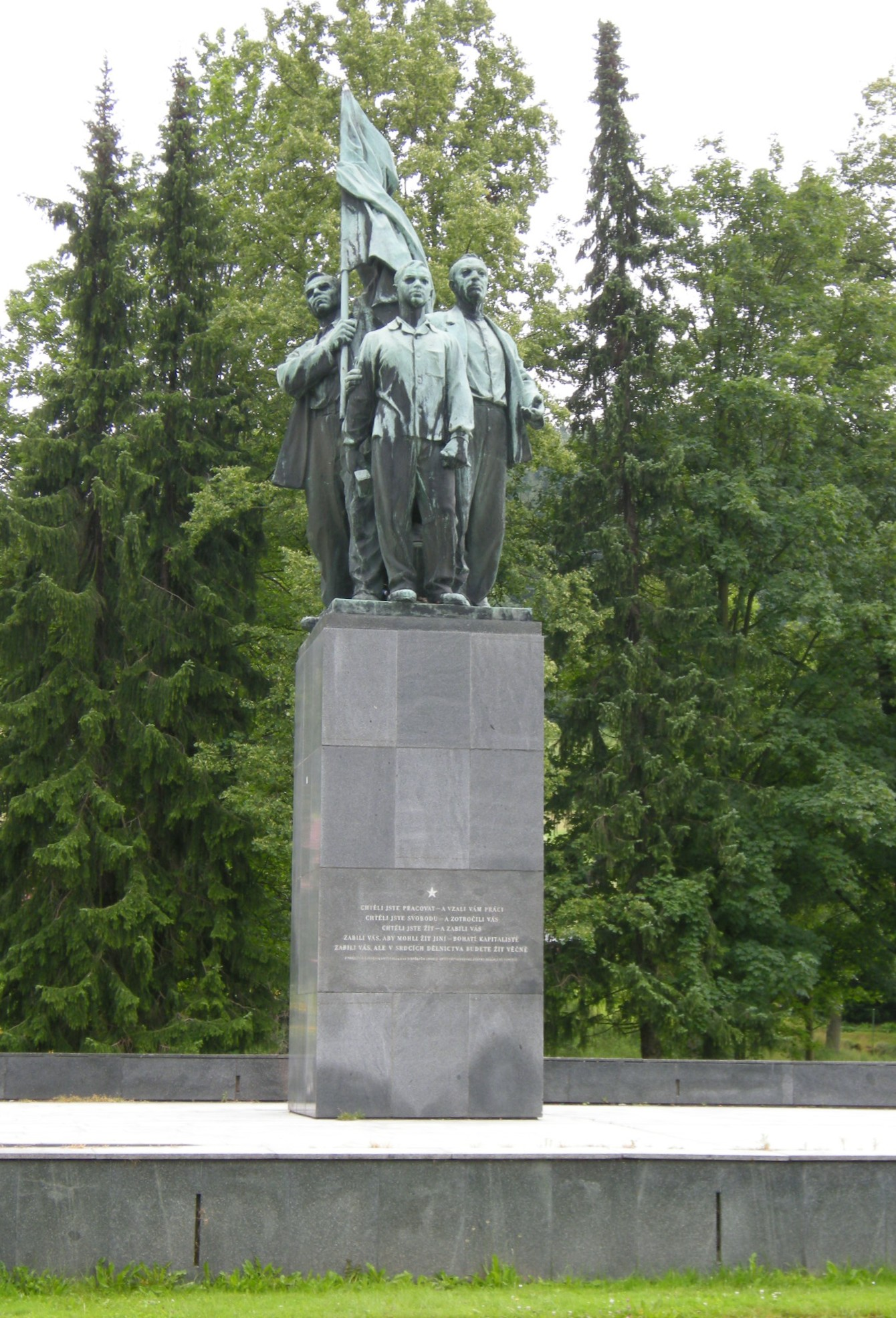 Pomnik Strajku frywaldowskiego w